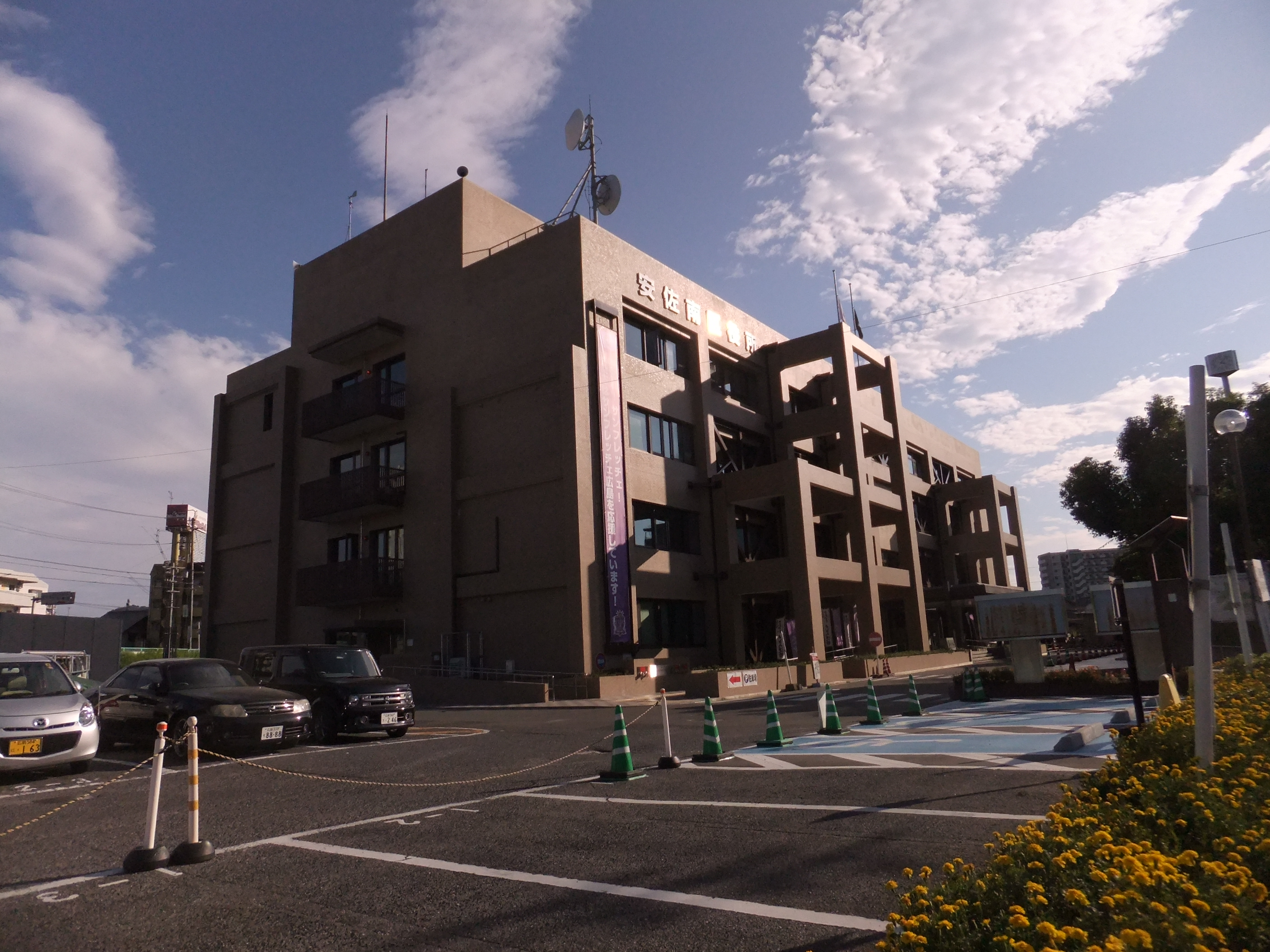 安佐南区役所